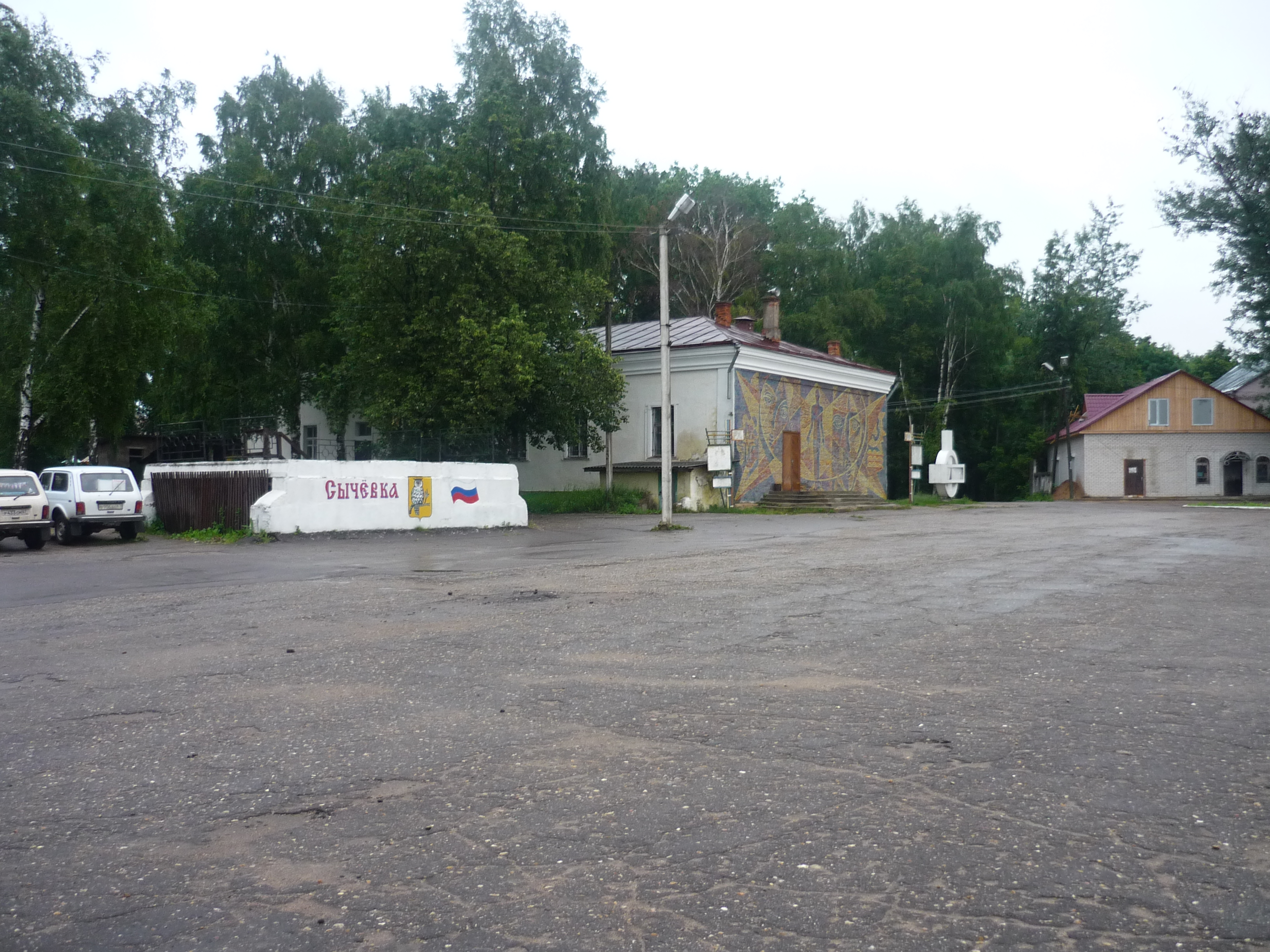 Центральная площадь Сычёвки, кинотеатр